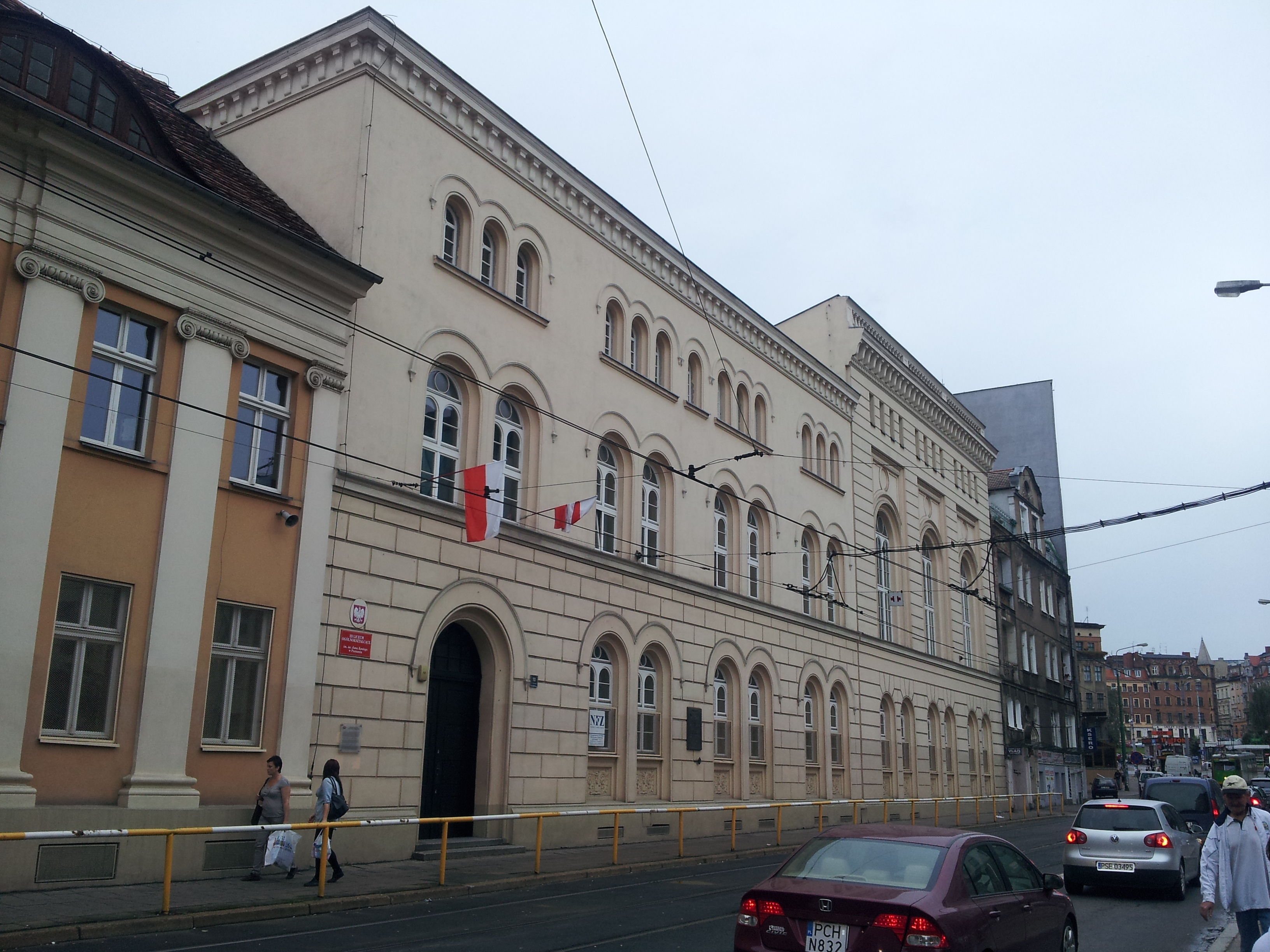 Poznań, ul. Strzelecka 10 - dawne gimnazjum, obecnie III LO (zabytek nr A 014)